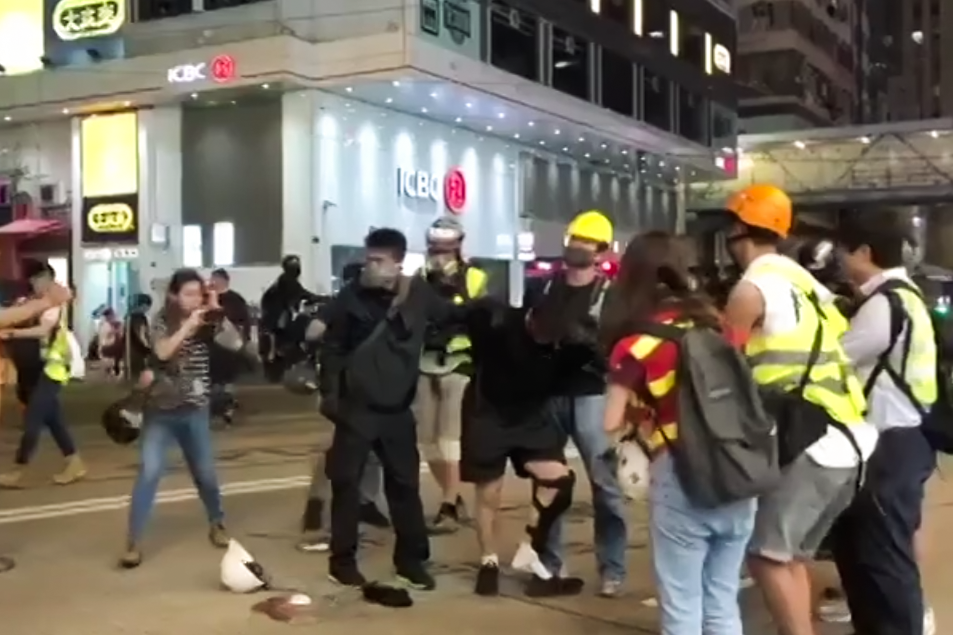 香港警務人員打扮成示威者混入示威群眾